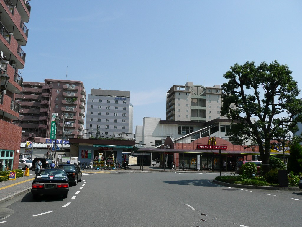 新狭山駅北口